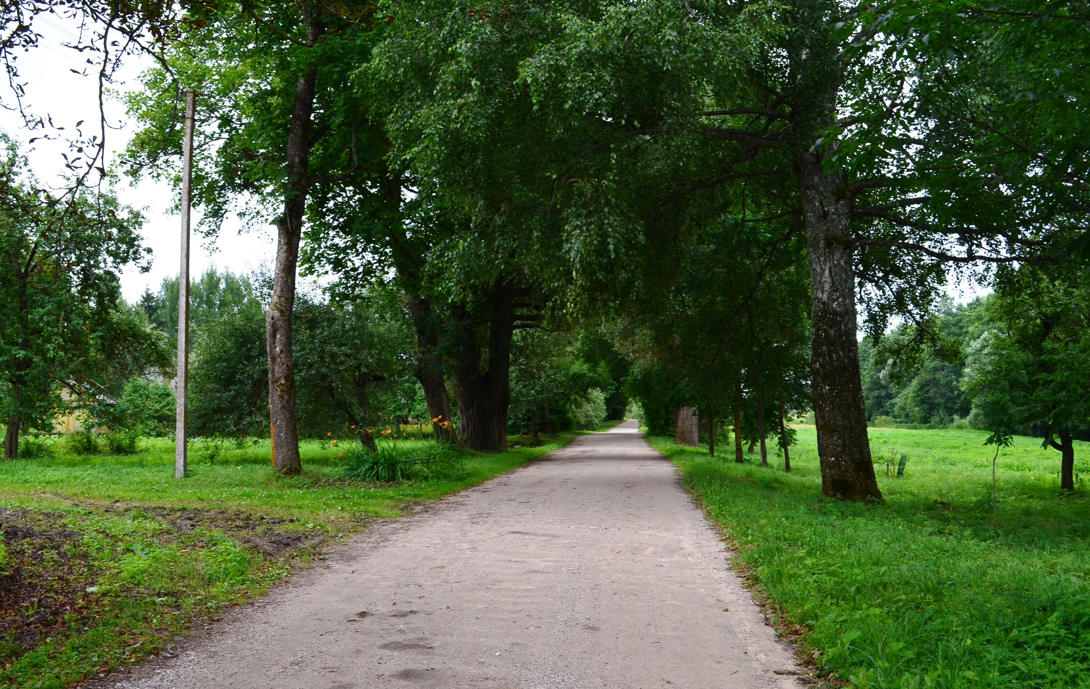 Štaronys, Rokiškio r.